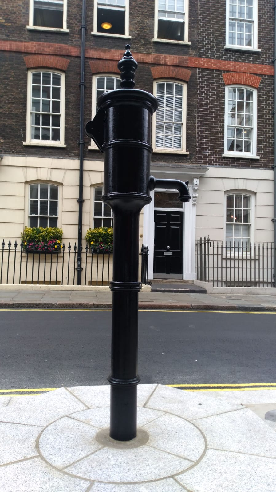 Veduta del monumento dedicato a John Snow collocato davanti all'omonimo pub in Broadwick Street